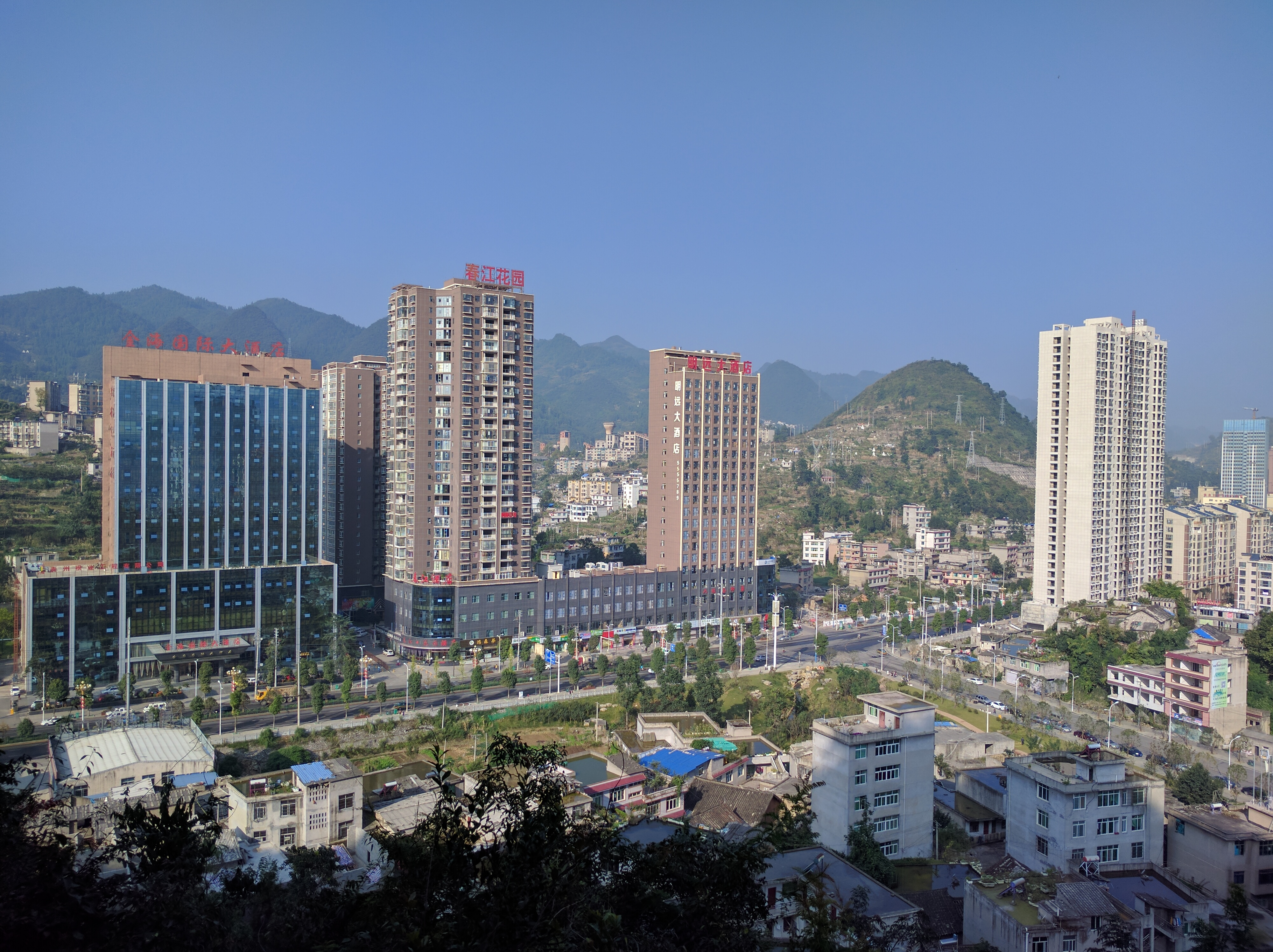 六枝特区南环路